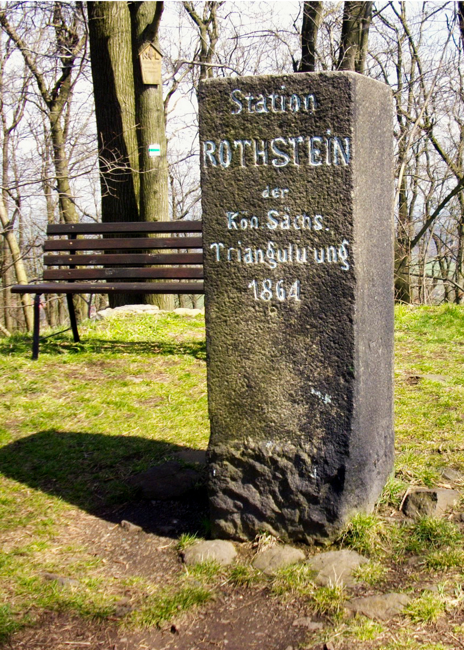 Königlich-Sächsische Triangulation Station 42 Rothstein Vermessungspunkt II. Ordnung